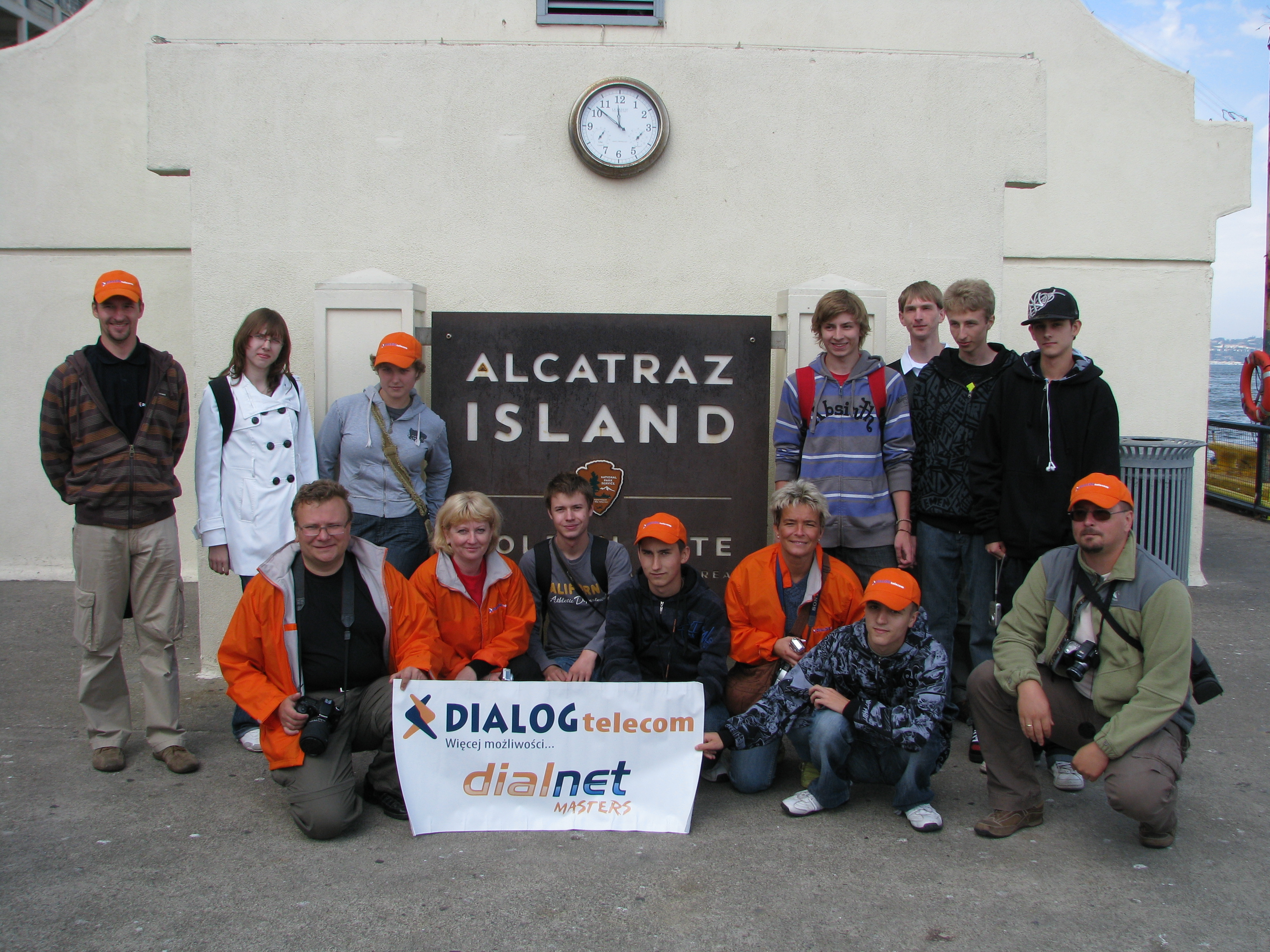 Zwycięzcy DialNet Masters 2008 na wycieczce w USA